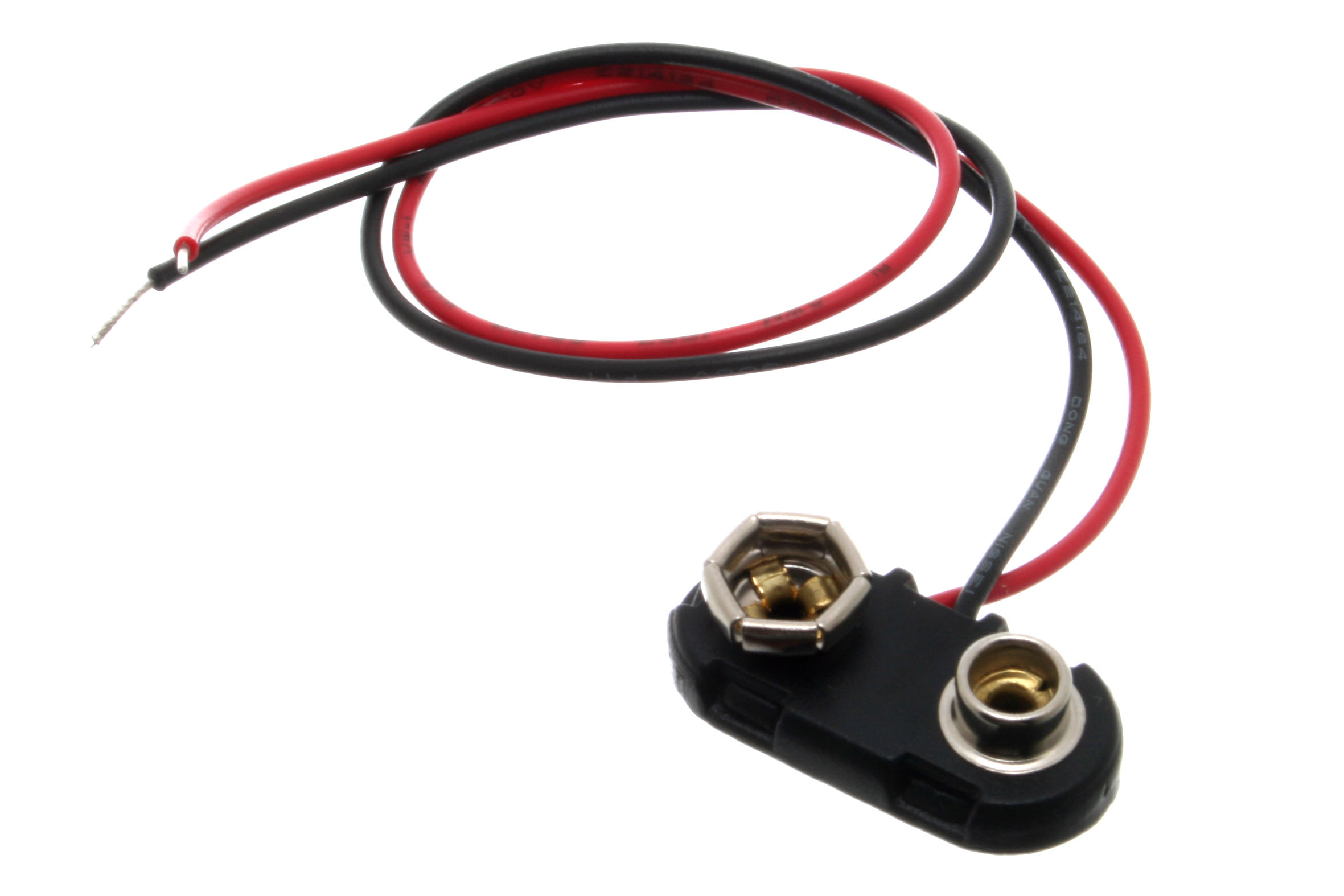 9 volt Battery Snap.